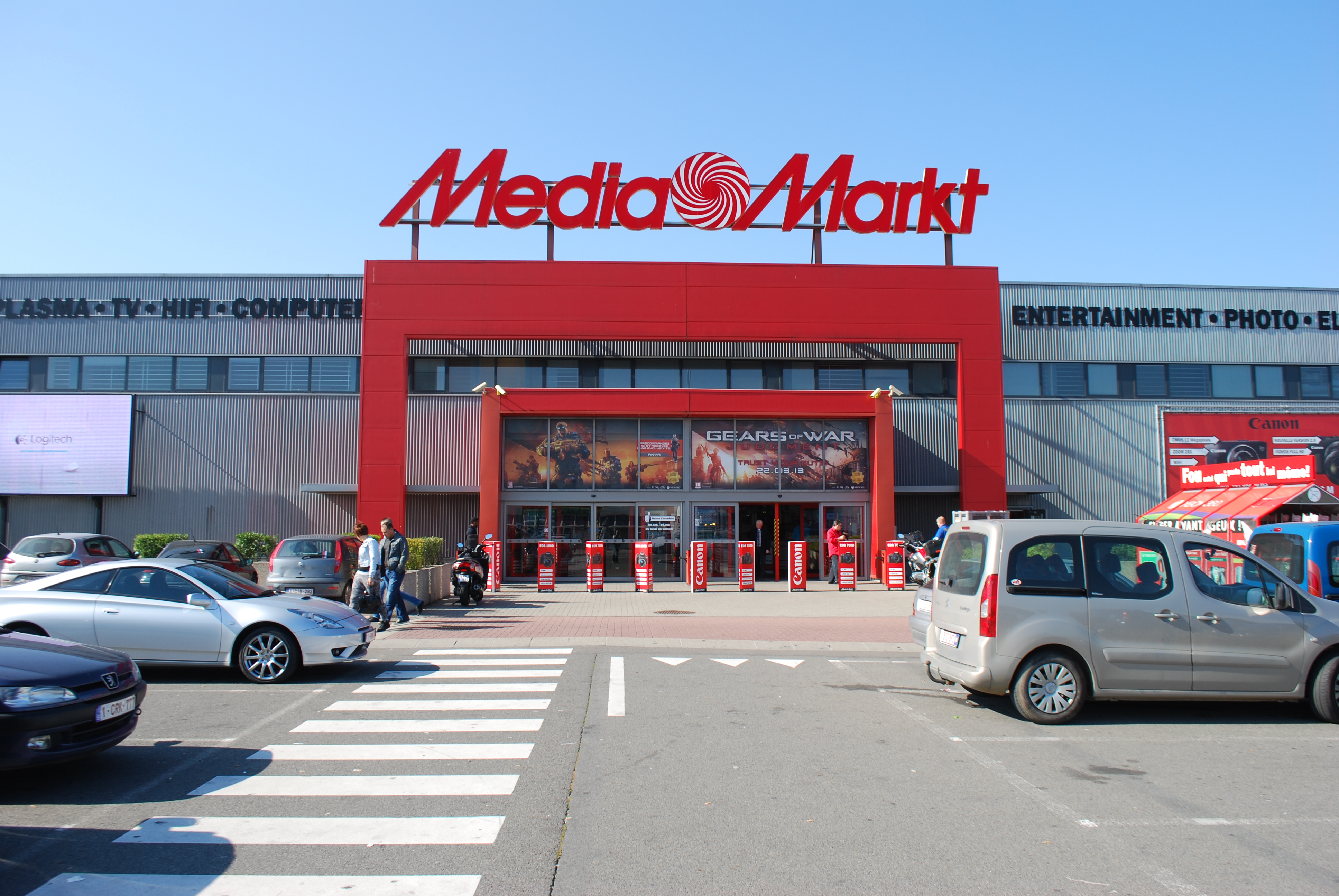 Vue du centre commercial "Basse Campagne" à Herstal.